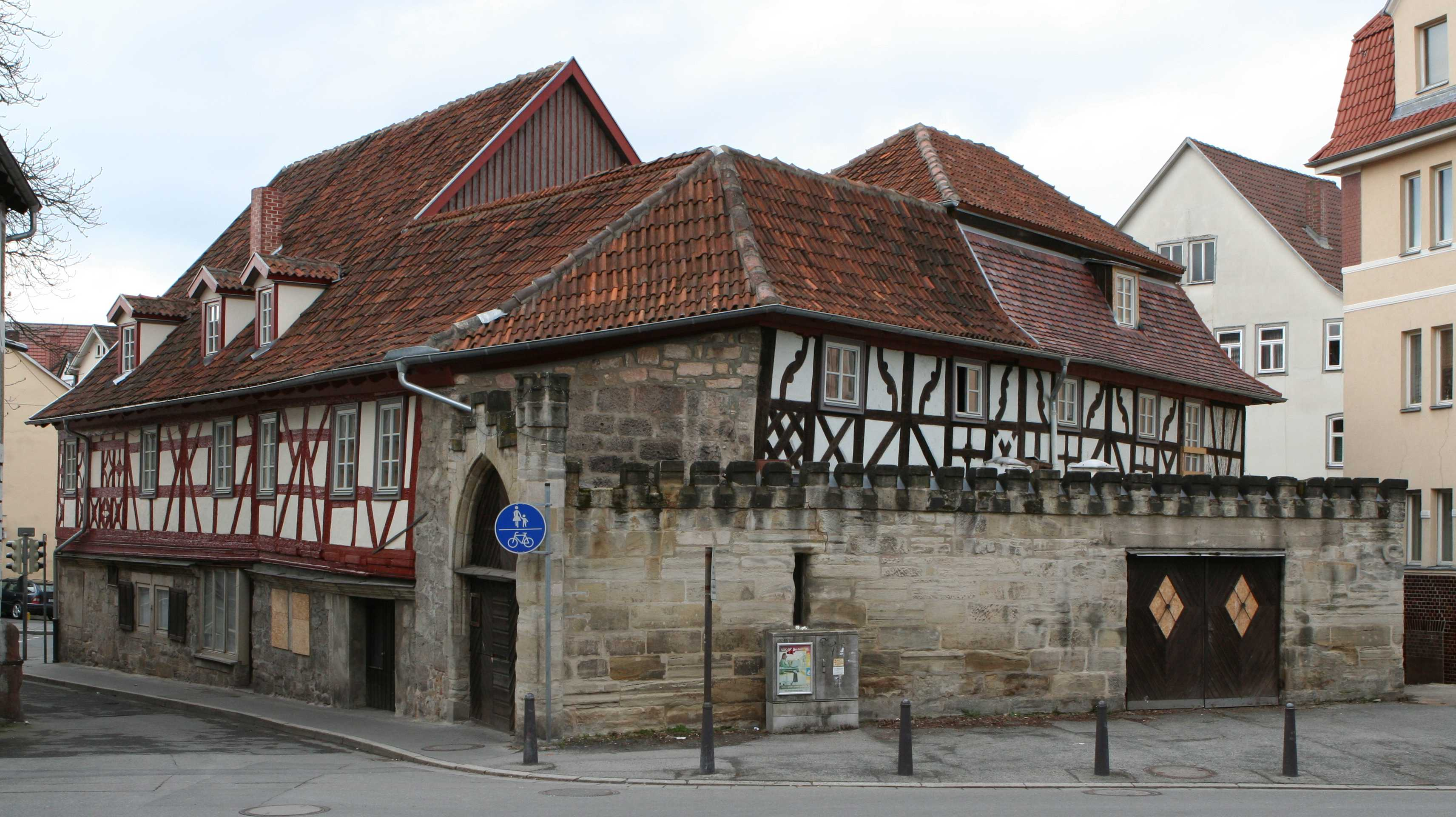 Hahnmühle in Coburg